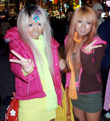 Ganguro style (Tokyo, Japan).